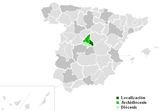 Mapa de la provincia eclesiástica de Alcala de Henares.